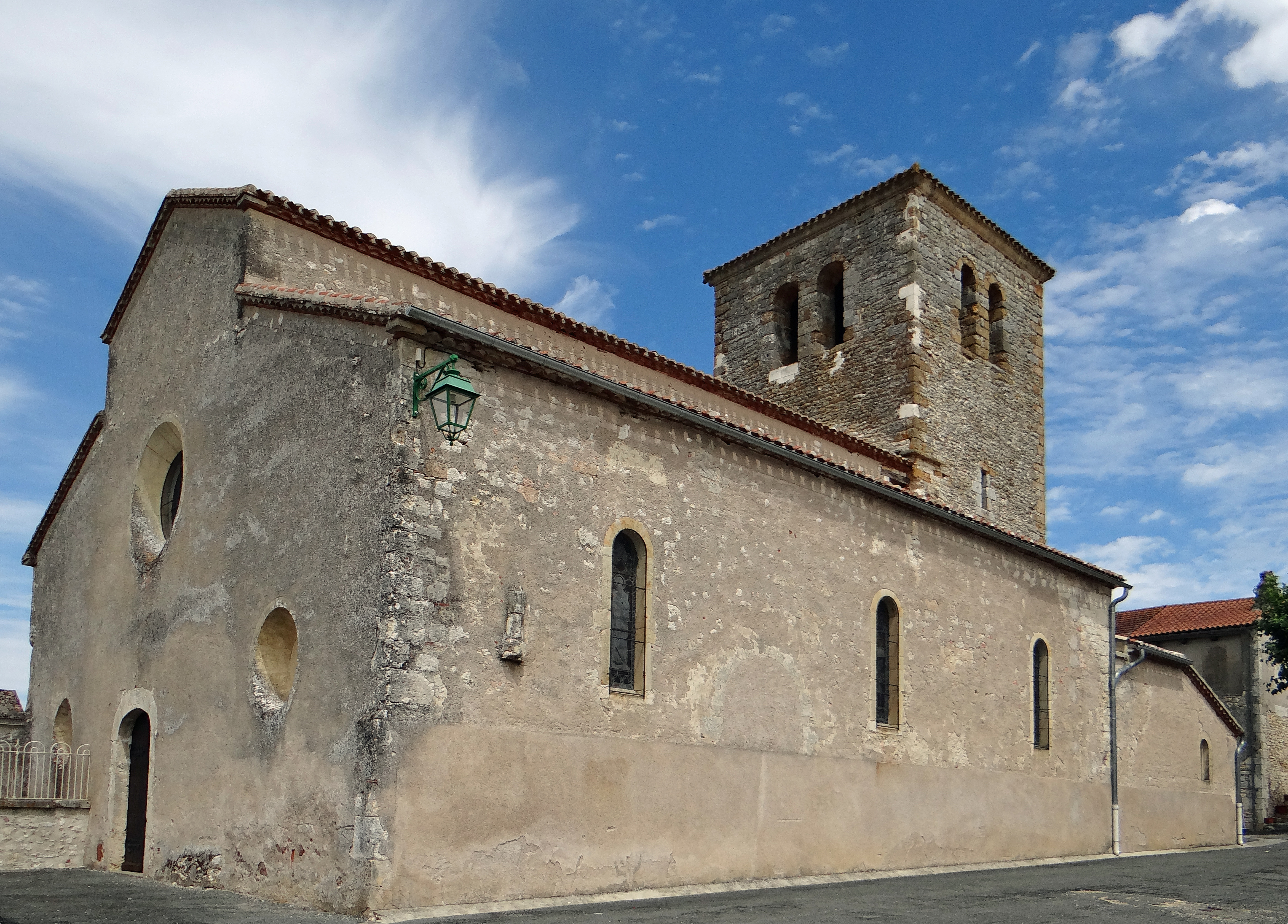 Bourlens - Église Saint-Pierre-aux-Liens - Ensemble